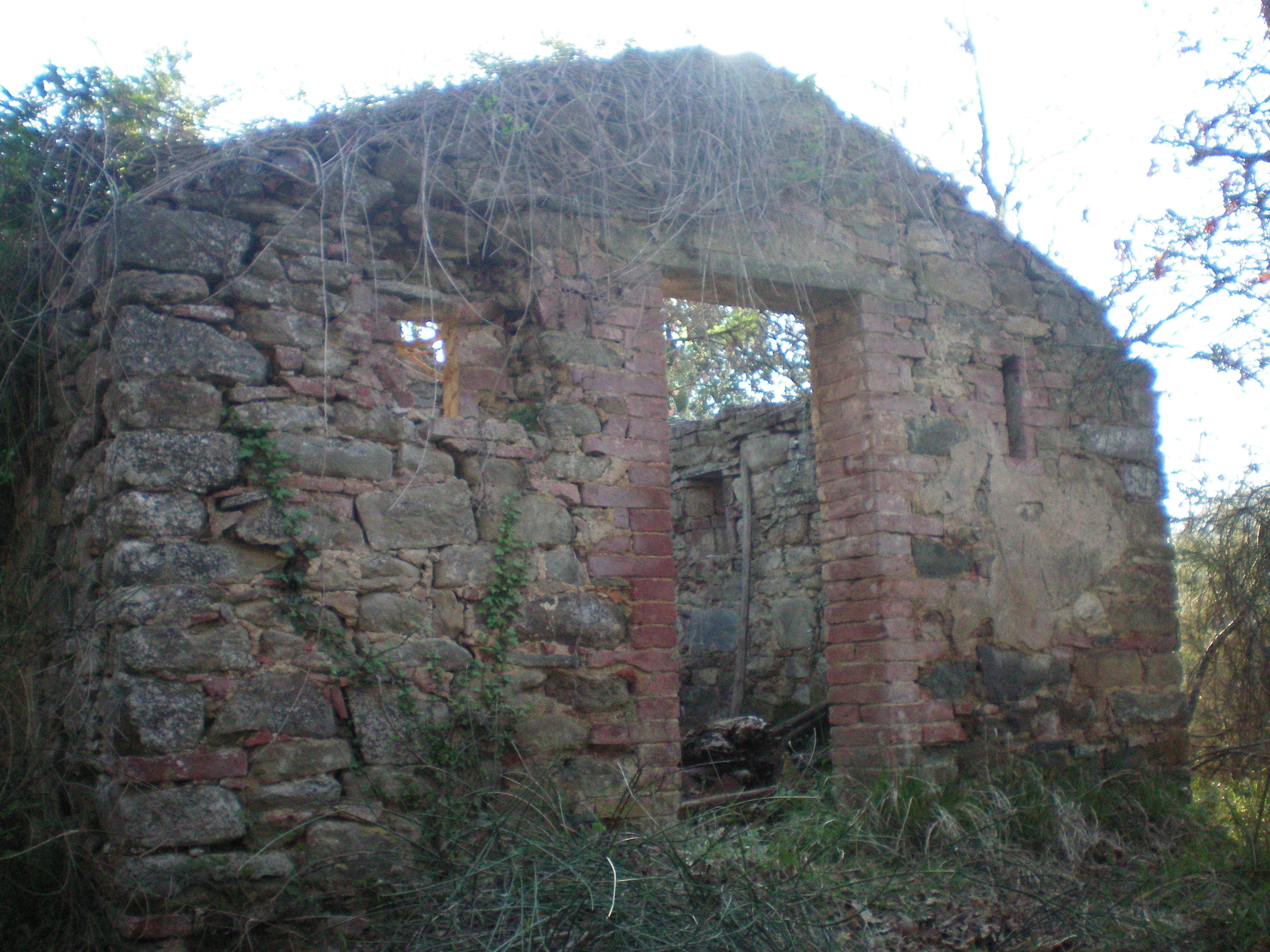 Romitorio di Farnetella (Siena)